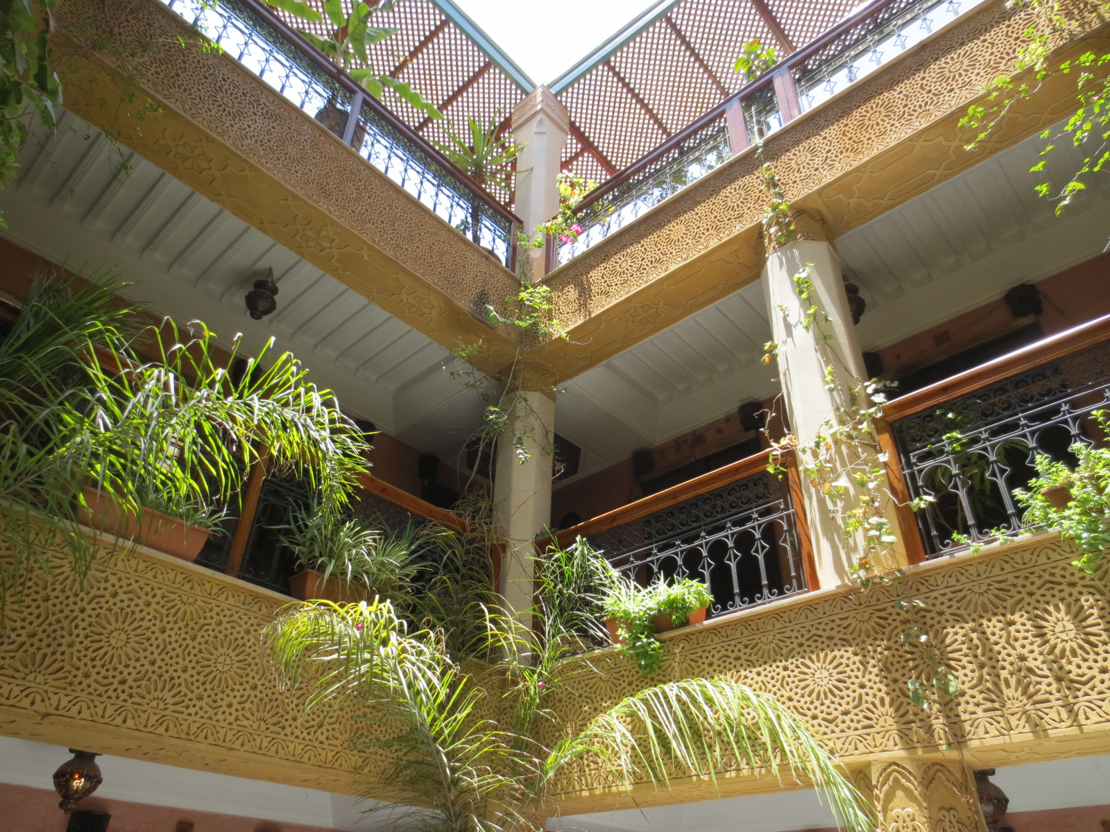 Riad au Maroc